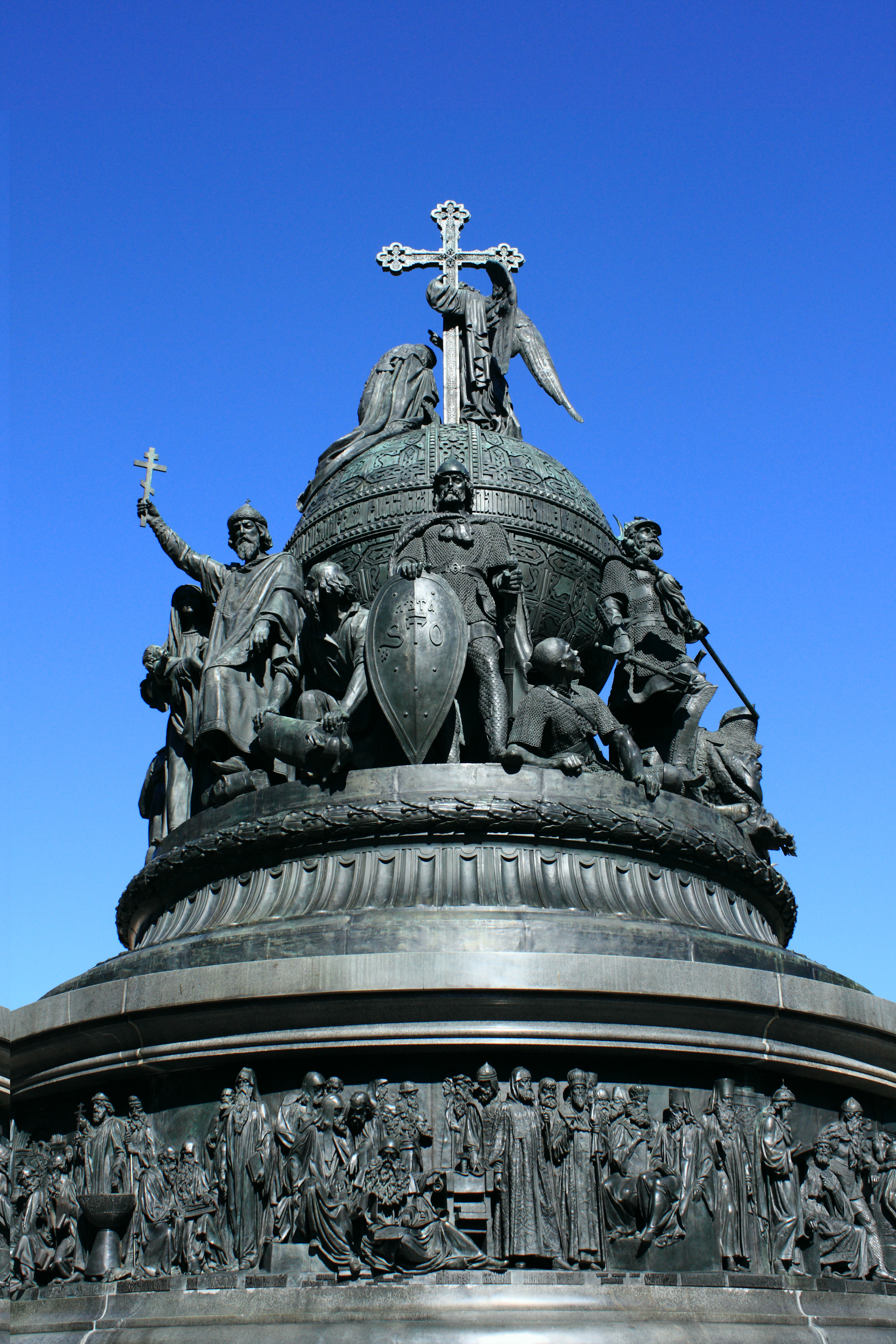 Великий Новгород, Кремль, памятник "Тысячелетие России" сентябрь 2012